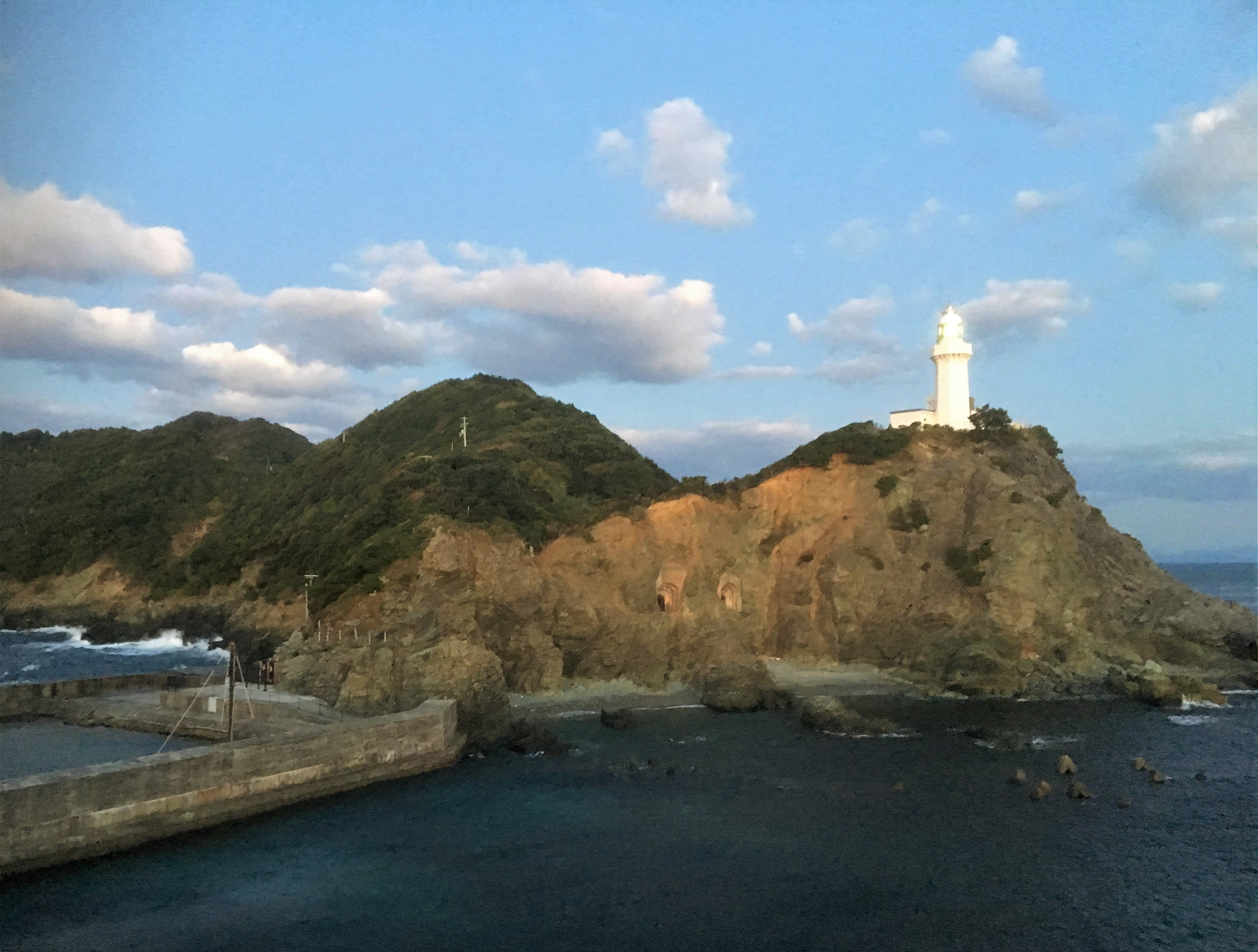 佐田岬灯台(右）と佐田岬砲台（中央）。夕刻の点灯。